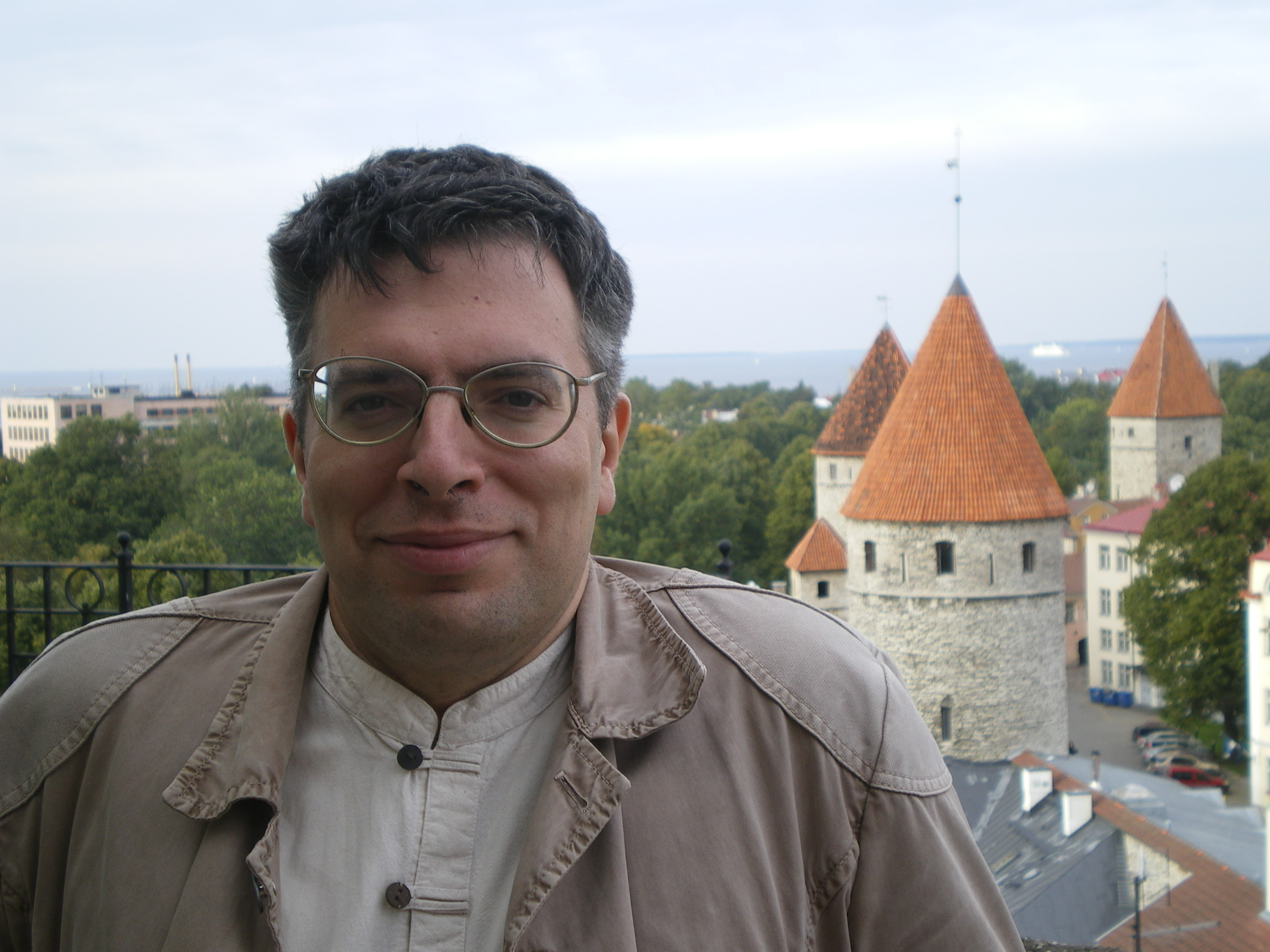 Pildil on Toomas Trapido 2010.a. september, Toompea, Tallinn.